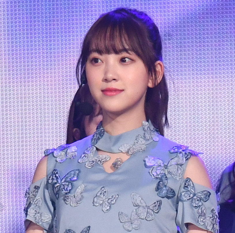 2019.01.26「第14回 KKBOX MUSIC AWARDS in Taiwan」乃木坂46 @台北小巨蛋